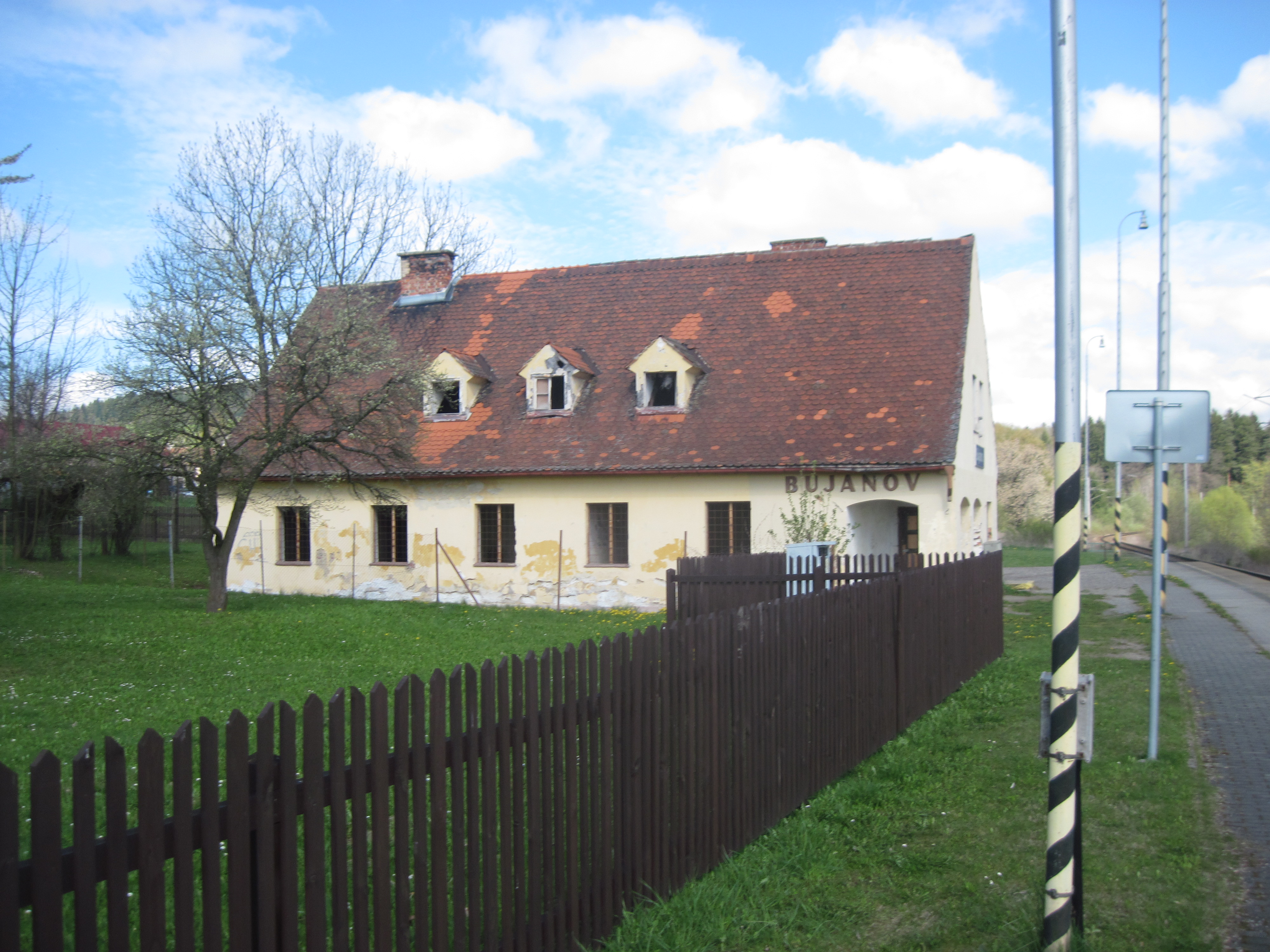 železniční zastávka Bujanov